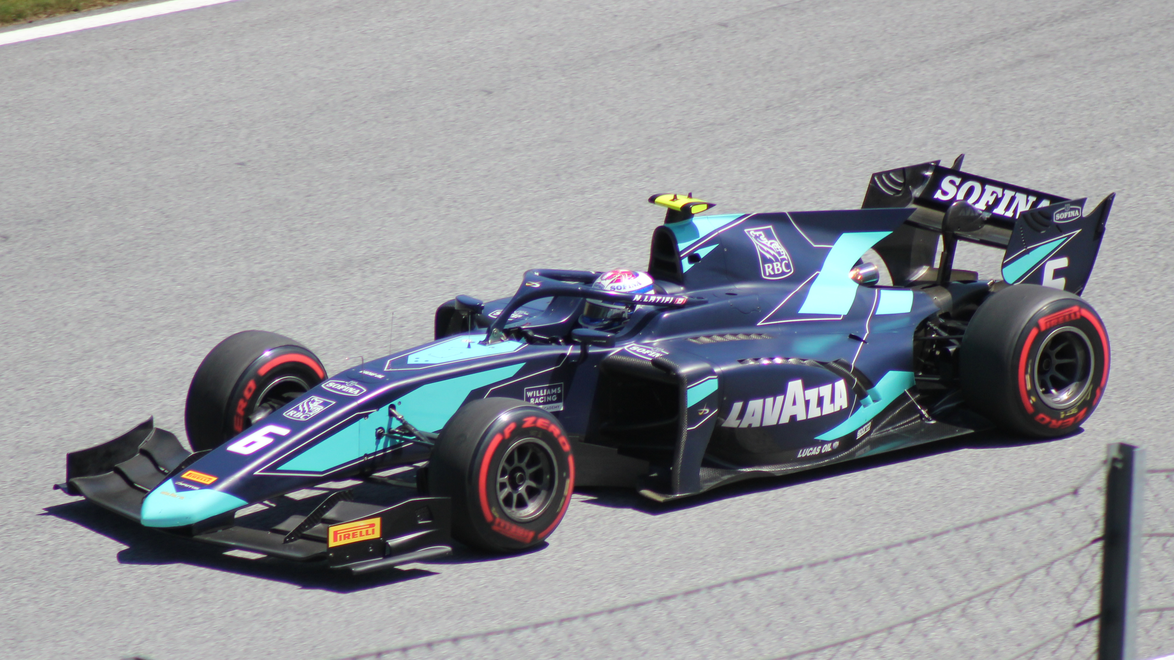 Latifi beim Rennwochenende in Österreich 2019